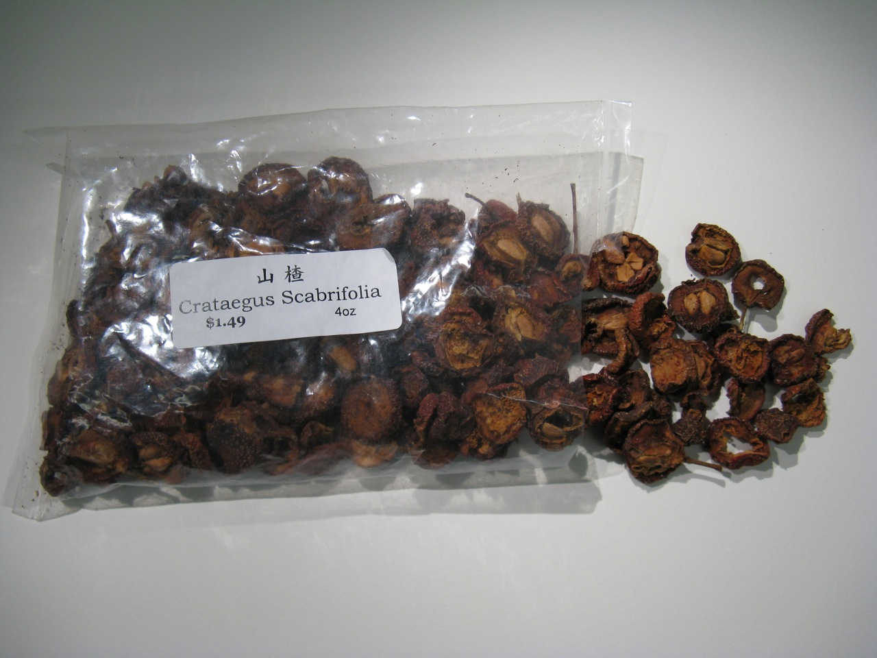 Dried Crataegus scabrifolia fruits